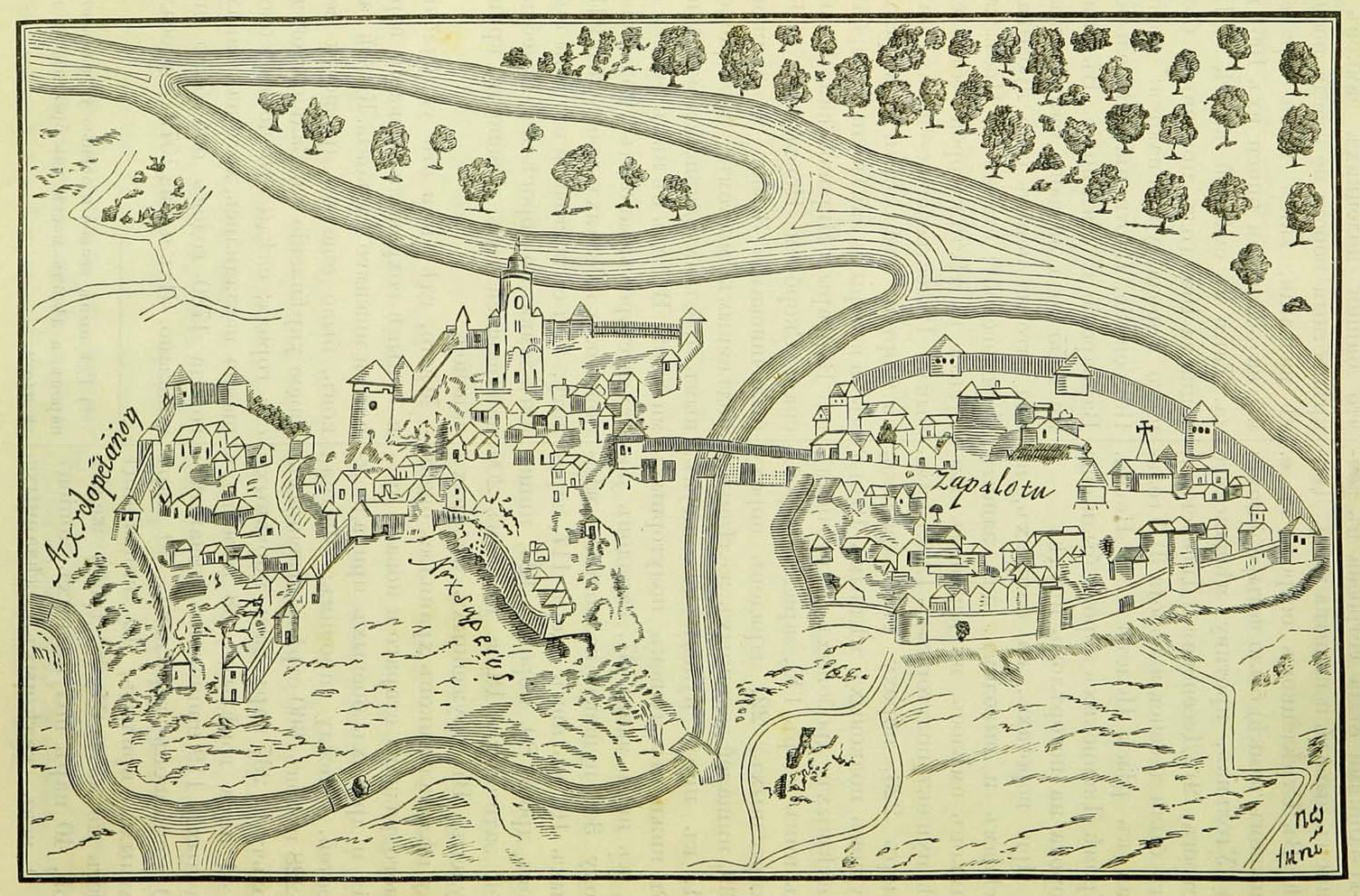 Беларуская (тарашкевіца): Полацак (Połacak)